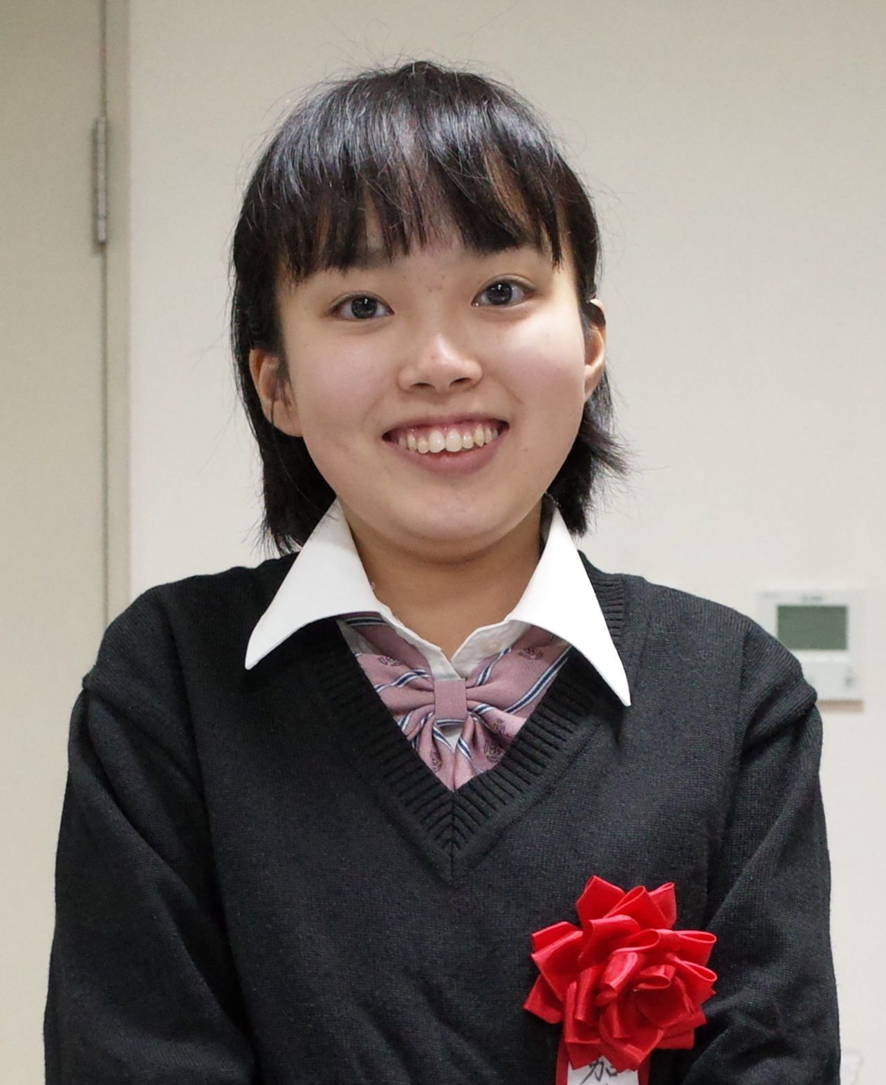 加藤結李愛女流初段。2019年10月29日、棋士会みやぎ将棋フェスティバルにて。